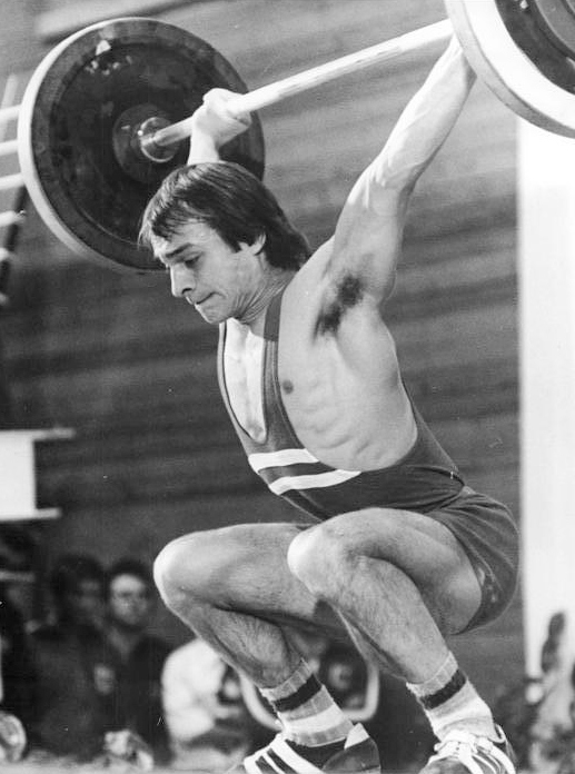 Frank Mavius ADN-ZB Mittelstädt 23.07.1978 Frankfurt-O.:Gewichtheben-Mit einer Leistung von 90,91 Prozent im Verhältnis zum bestehenden Weltrekord gewann Fliegengewichtler Frank Mavius (SC Einheit Dresden) den Verbandspokal des Deutschen Gewichtheberverbandes der DDR. Mavius, sonst im Bantamgewicht startend, hatte bei den am 22.07.1978 in Frankfurt-O. beendeten zweitägigen Wettbewerben mit 95 kg im Reißen, 125 und 130 kg im Stoßen und 225 kg im Zweikampf vier DDR-Rekorde aufgestellt. Das Foto zeigt ihn in einem früheren Wettkampf.